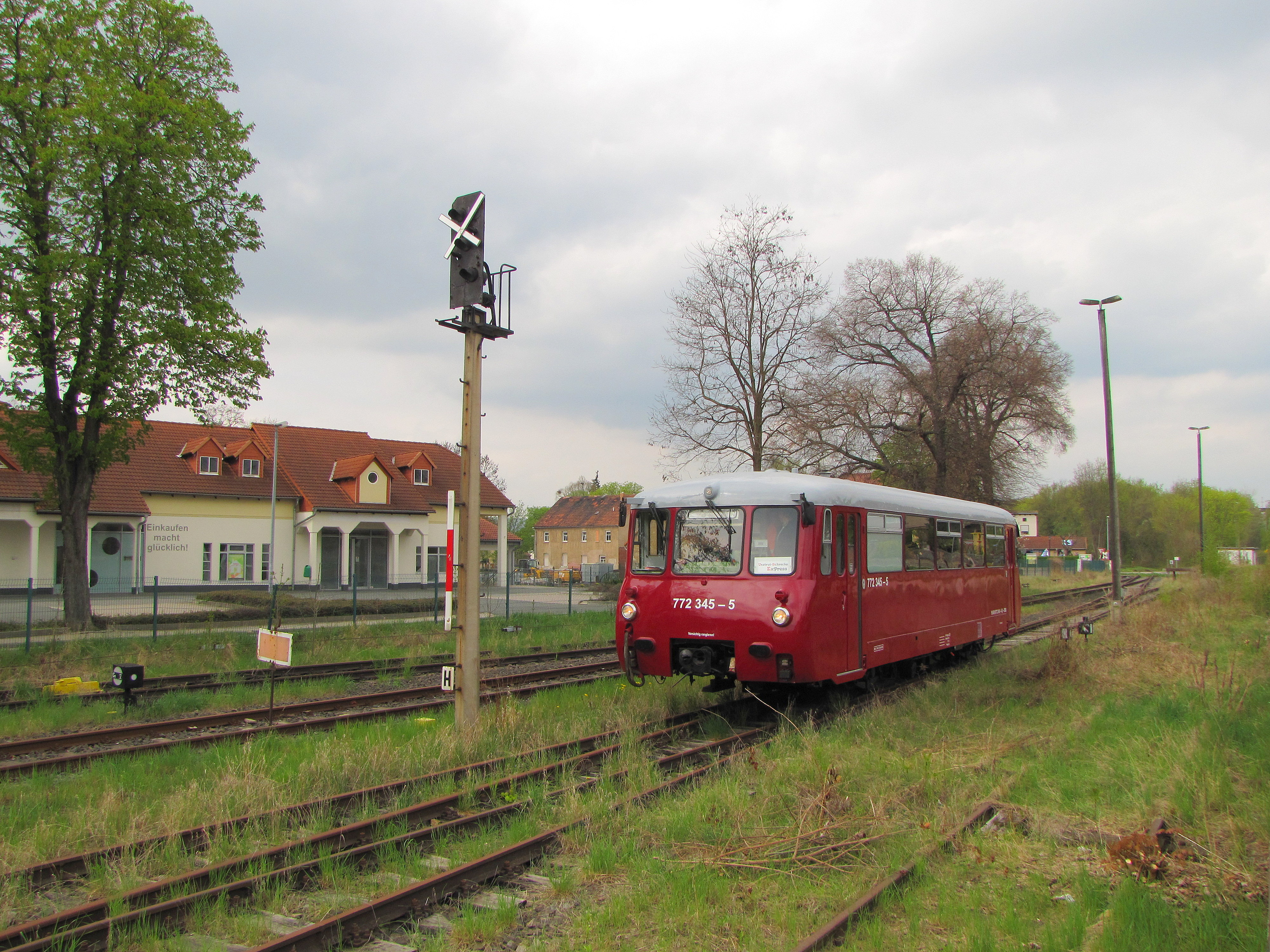 Das "Ferkeltaxi" 772 345-5 der Erfurter Bahnservice als "Unstrut-Schrecke-Express aus Erfurt Hbf, am 01.05.2013 in Roßleben.